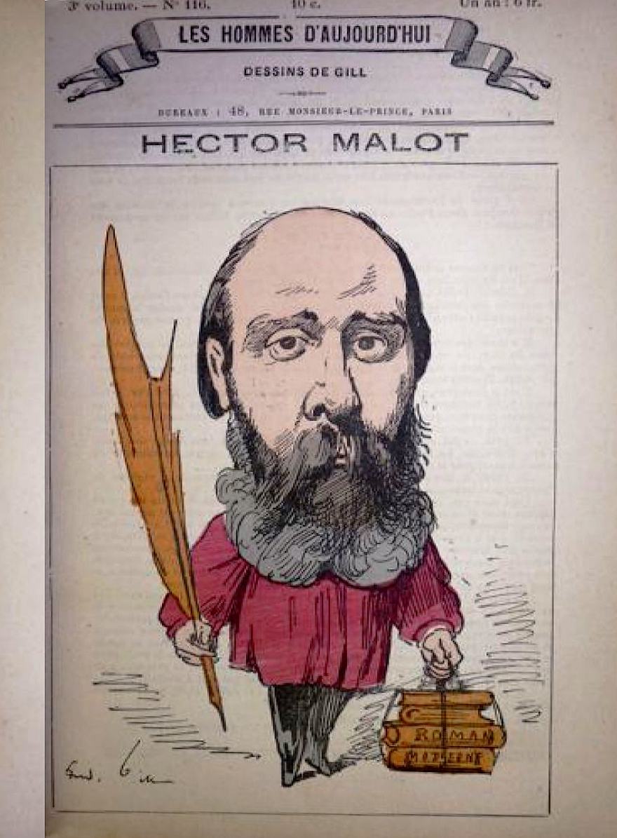 Hector Malot par André Gill, Les Hommes d'aujourd'hui, n°116, vers 1880